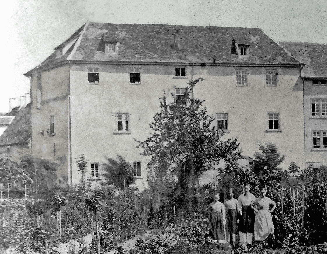 Die Mauern des heute „Mittelbau“ genannten Teils des Schlossareals stammen von der ehemaligen Reichsburg Grüningen